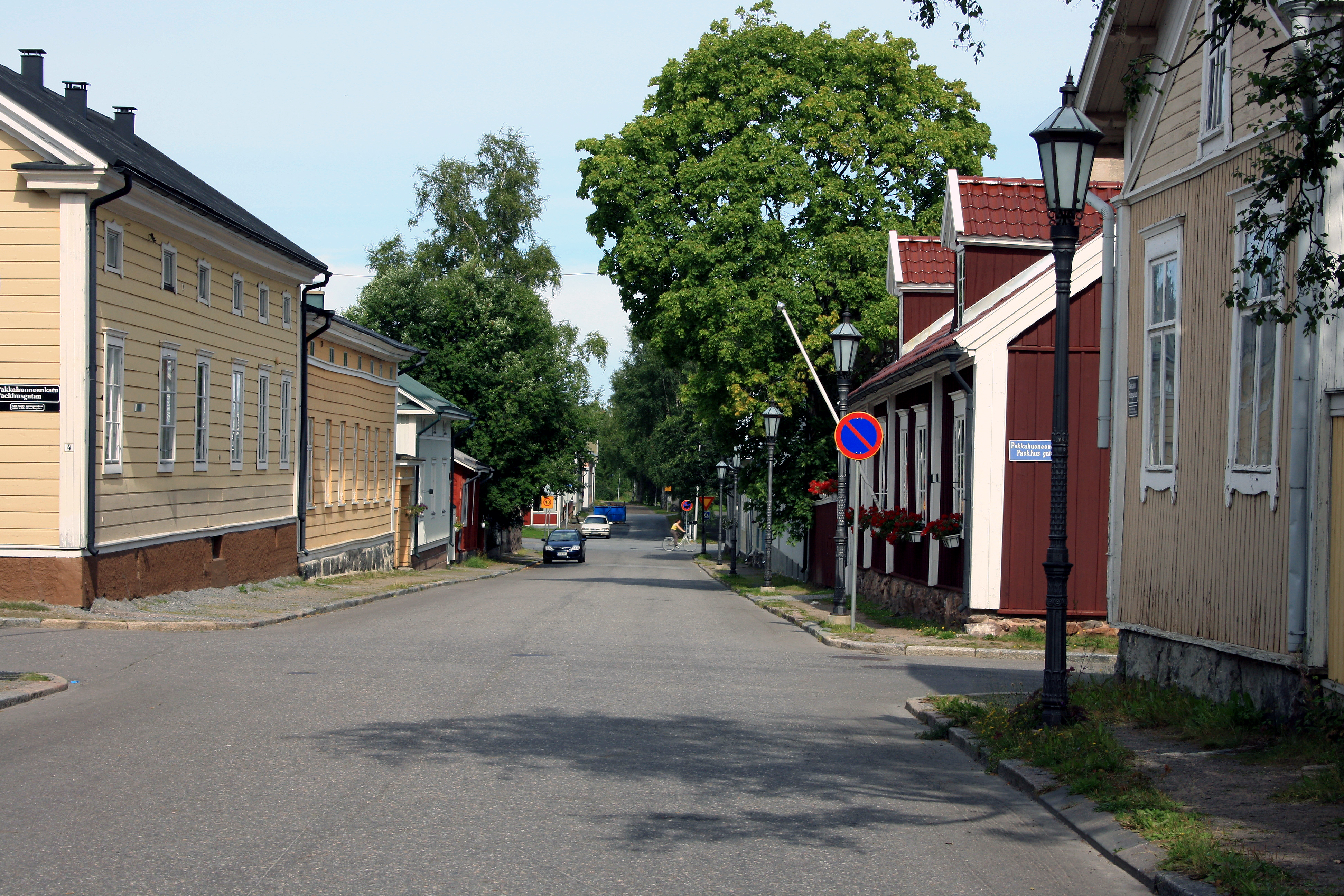 Isokatu Kokkolassa, Suomessa.